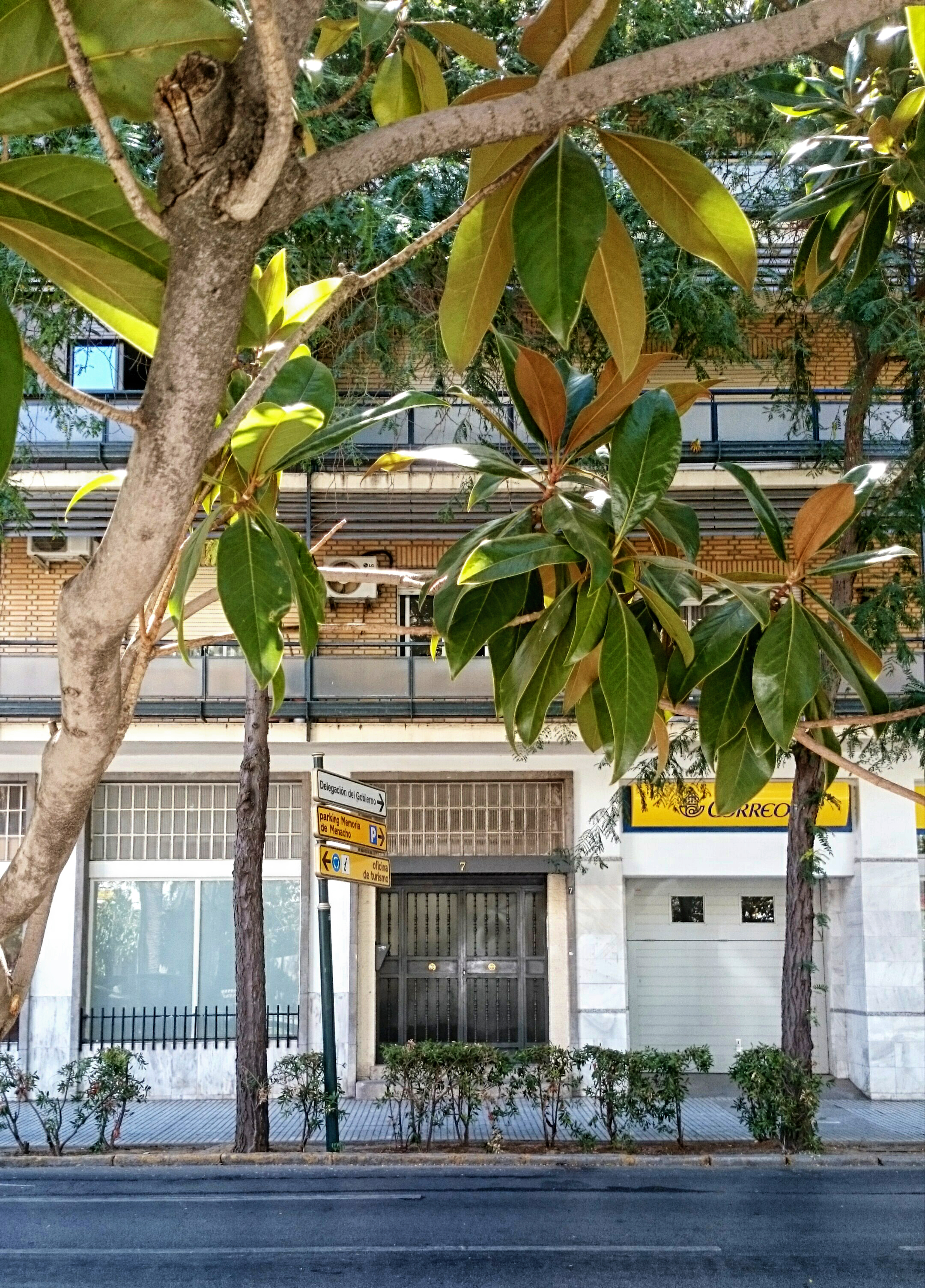 Badajoz. Vista parcial del bloque de oficiales del Ejército del Aire ubicado en la Avda. Cristóbal Colón n.º 7.